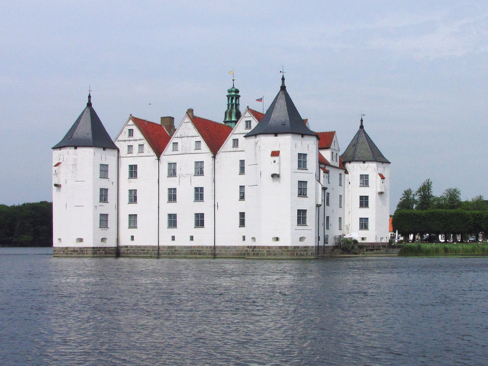 Kulturdenkmal Schloss Glücksburg 4.1d Wasserschloss Ansicht von Süden - Schleswig-Holstein - Foto 2012 Wolfgang Pehlemann Steinberg/Ostsee IMG_8066